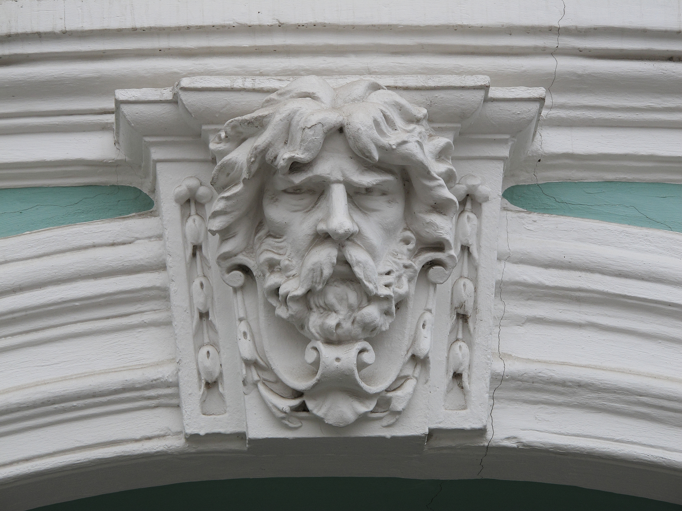 Земська управа (Будинок, пов'язаний з революційними подіями 1905 року) (мур.), Суми, вул. Г. Кондратьєва, 2